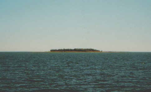 Pohled na ostrov Kräsuli od jihozápadu.